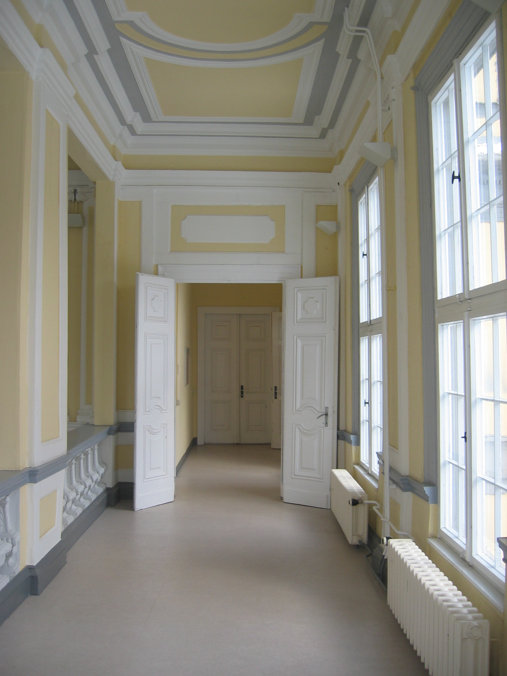 Innenansicht im ersten Obergeschoss. An einer Stelle, wo die Stukaturen noch nicht verloren gegangen sind.